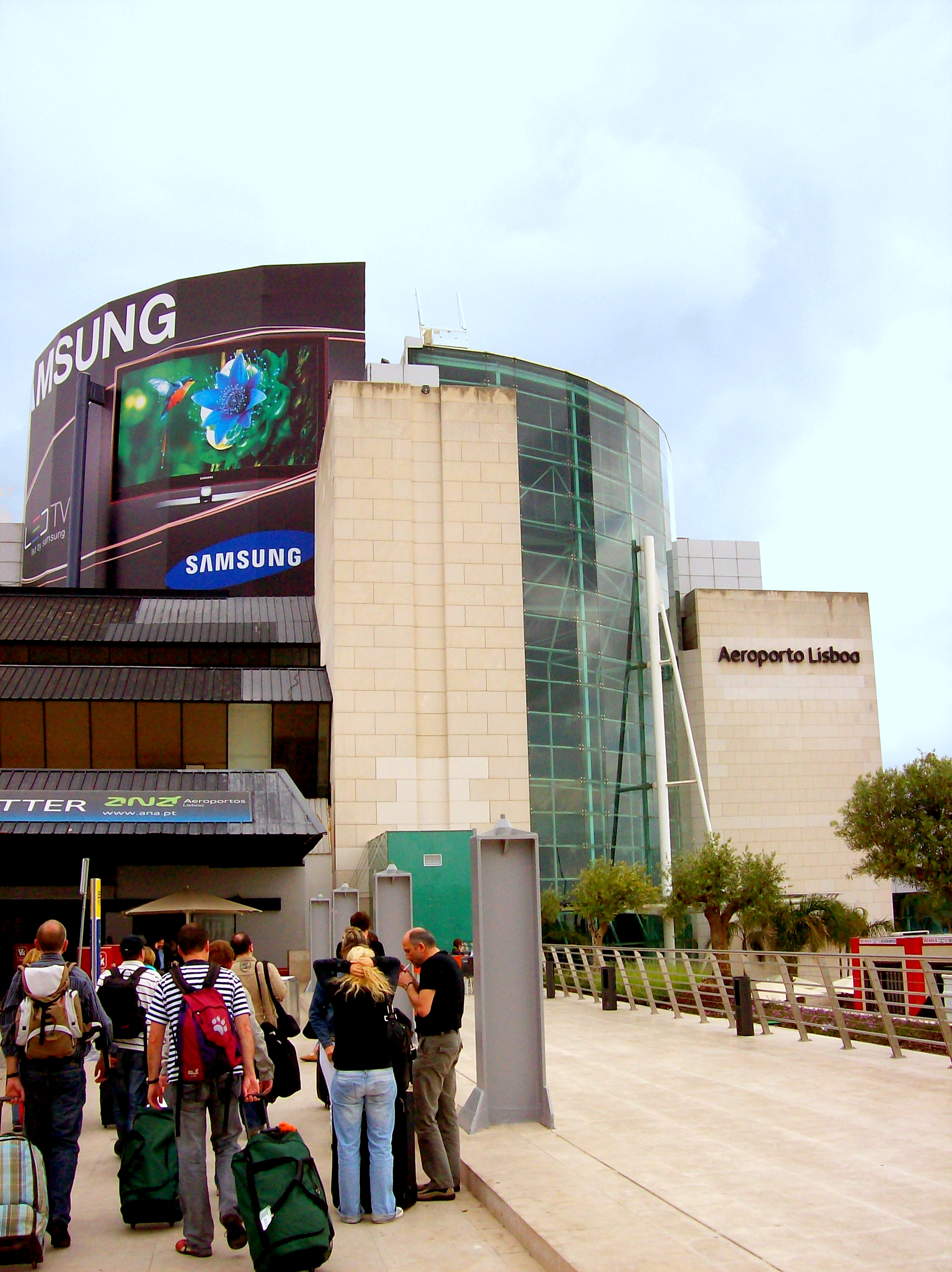 Aeroporto de Lisboa, Lissabon (Portugal)